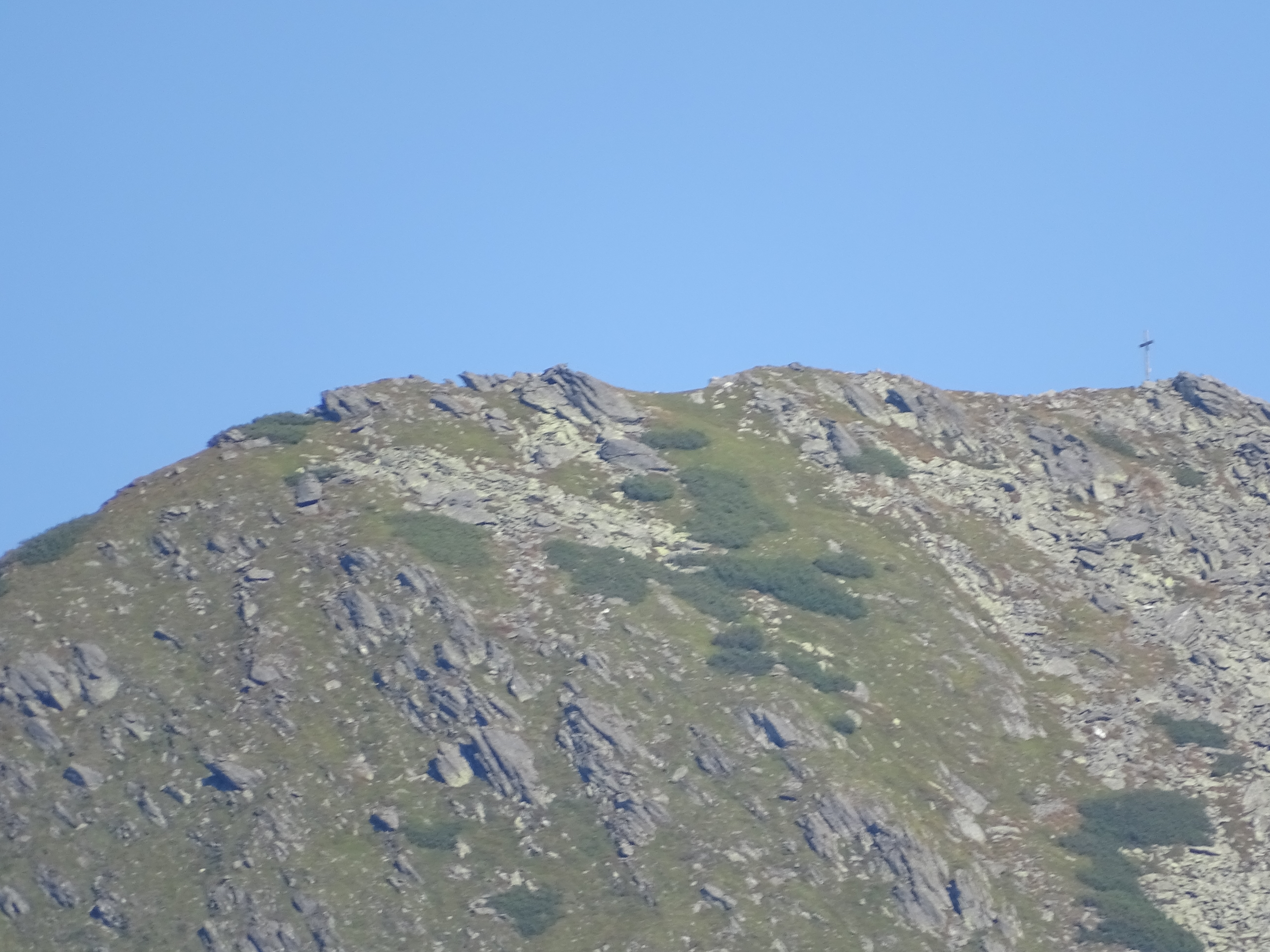 Der Gipfel der Seekoppe an der Gemeindegrenze von Aigen im Ennstal und Rottenmann.